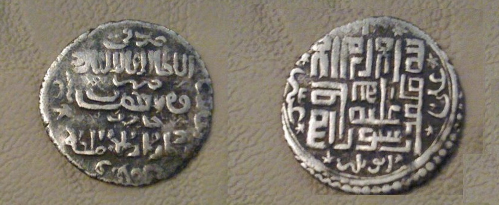 سکه ابوسعید